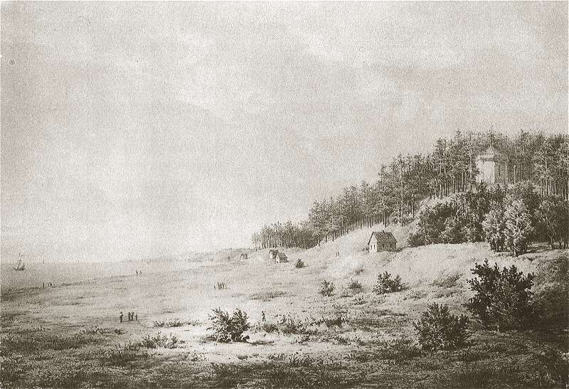 Birutės Hill in Palanga, Lithuania